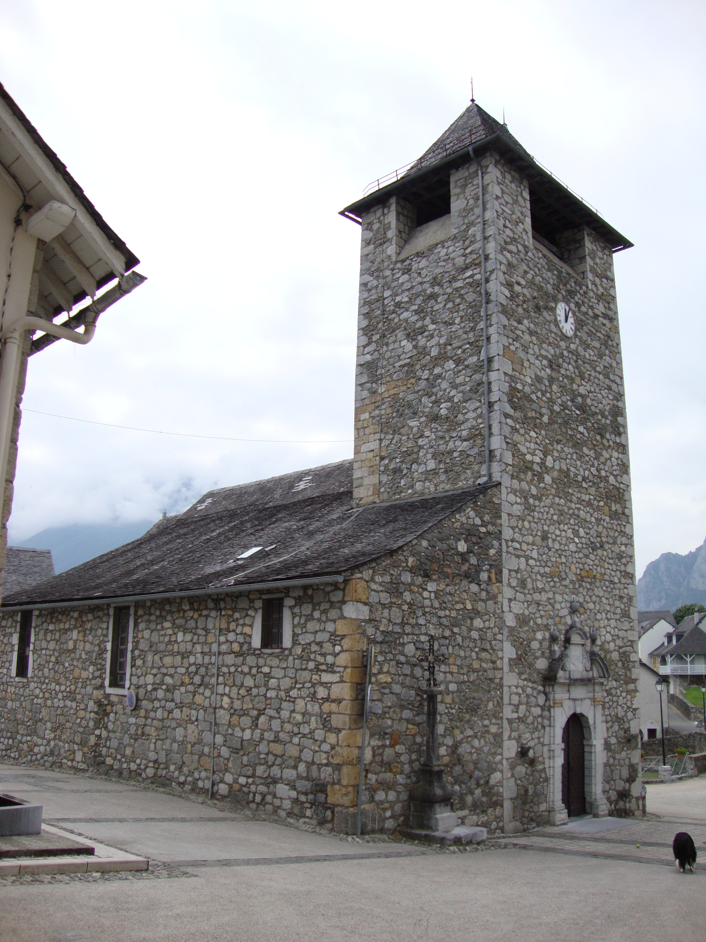 Osse-en-Aspe (Pyr-Atl, Fr) Church Saint-Étienne